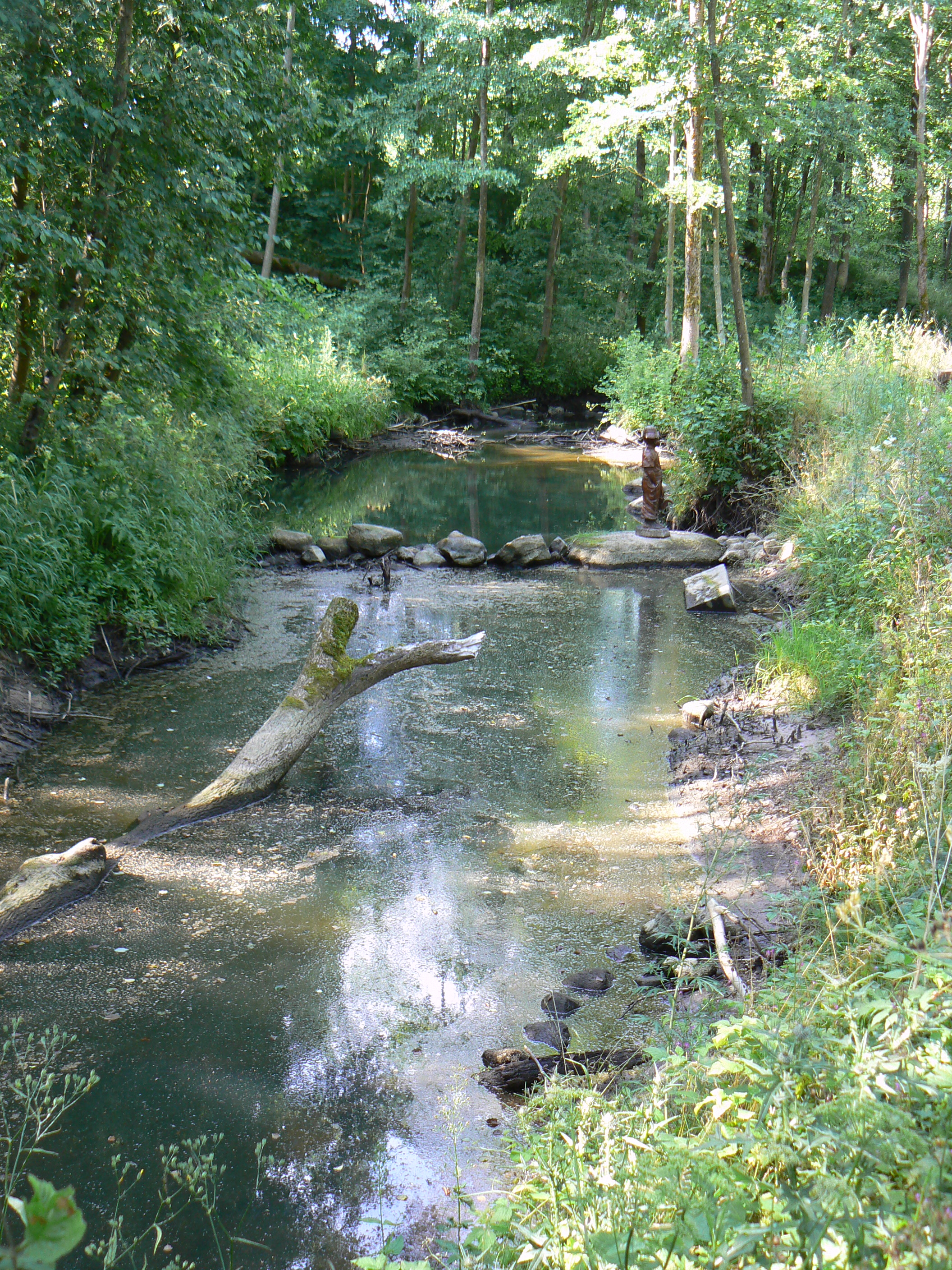 Burkštinas. Na kameni u kraje břehu jedna z mnoha vyřezávaných dřevěných soch v oblasti. Pohled po proudu, t.j. k východu.